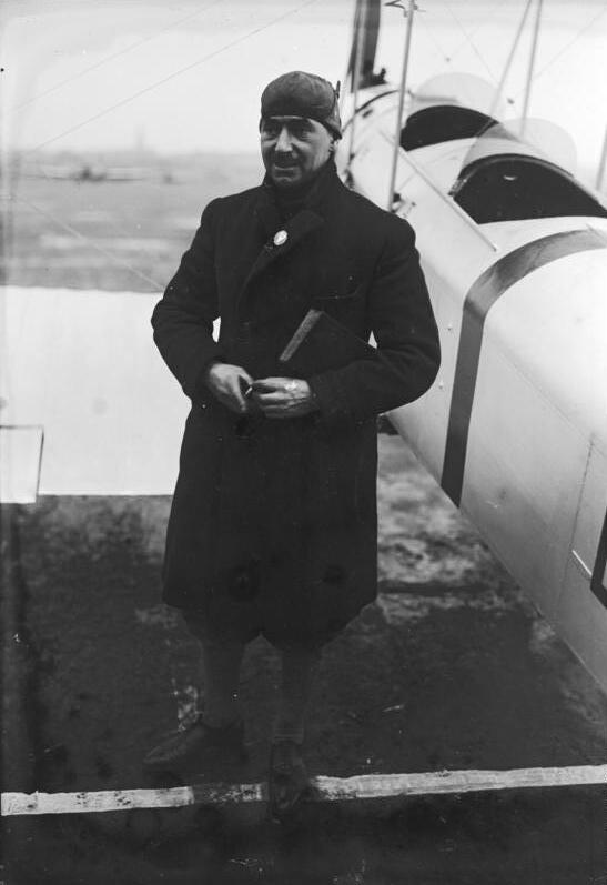 Der irländische Major Fitzmaurice Kommandeur der irländischen Luftflotte und Begleiter Köhl und Hünefelds beim Ozeanflug, ist in Berlin zum Besuch der "ILA" eingetroffen. Major Fitzmaurice bei seiner Ankunft auf dem Centralflughafen in Berlin-Tempelhof.